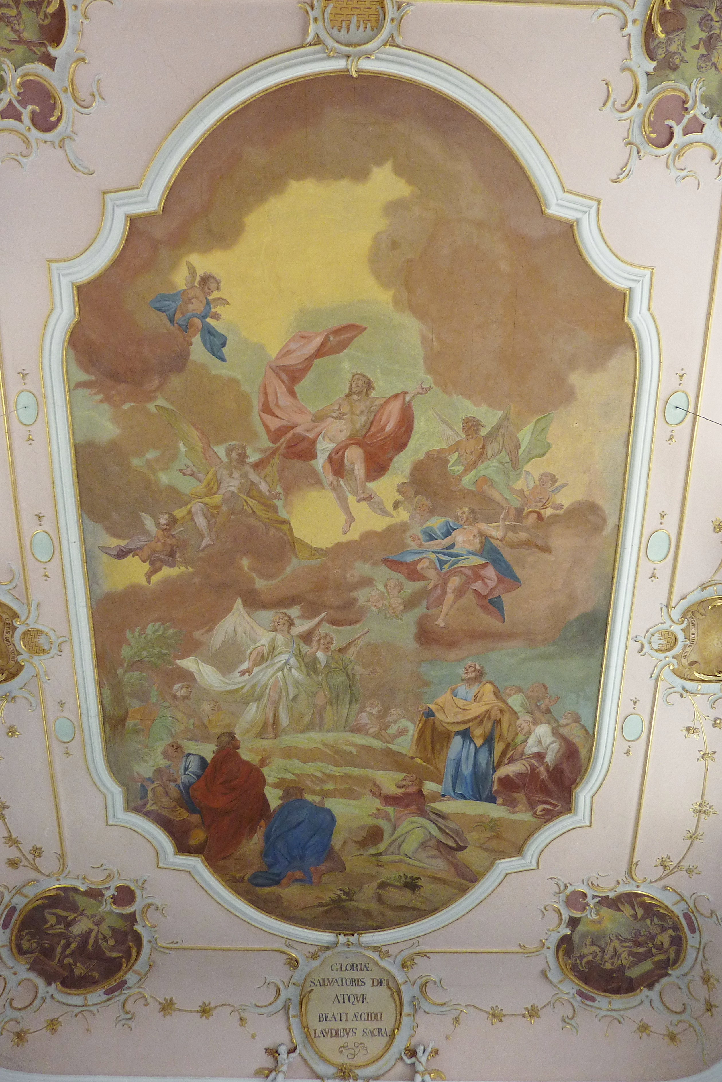 Katholische Pfarrkirche St. Ägidius in Schabringen, einem Ortsteil von Wittislingen im Landkreis Dillingen an der Donau (Bayern), Deckenfresko von Joseph Hartmann (Illereichen), von 1778; Darstellung: Christi Himmelfahrt. Signatur: JOSEPHUS HARTMANN INVENIT ET PINXIT AO 1778. In den Ecken Grisaillen, über dem Chorbogen in Kartusche Inschrift: GLORIAE SALVATORIS DEI ATQUE BEATI AEGIDII LAVDIBVS SACRA mit Chronogramm (die farblich gekennzeichneten Buchstaben LILVIDIVIIDIILVDIVC ergeben die Jahreszahl 1778.